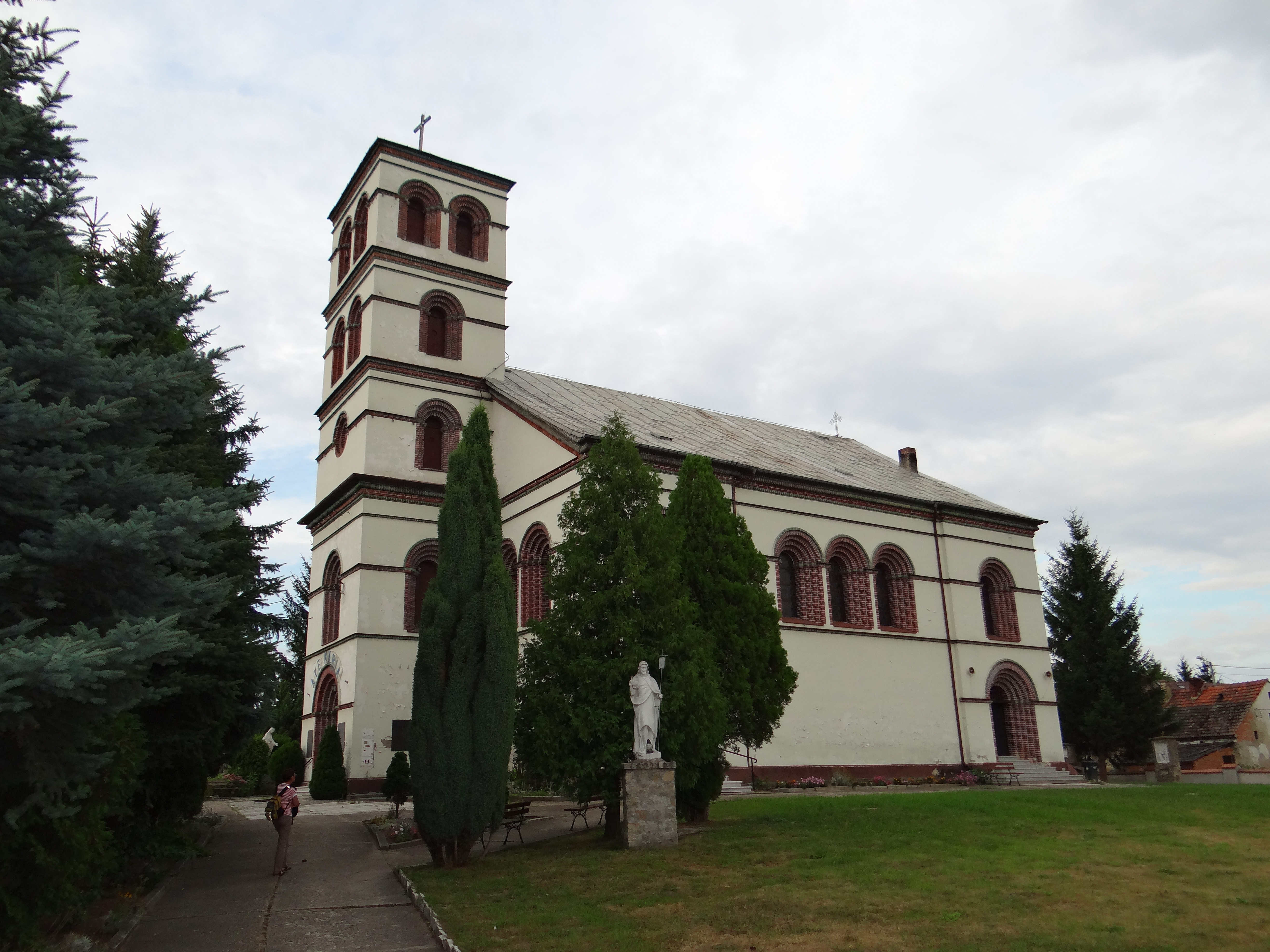 Wójcice, kościół par. pw. św. Andrzeja, 1816-1818